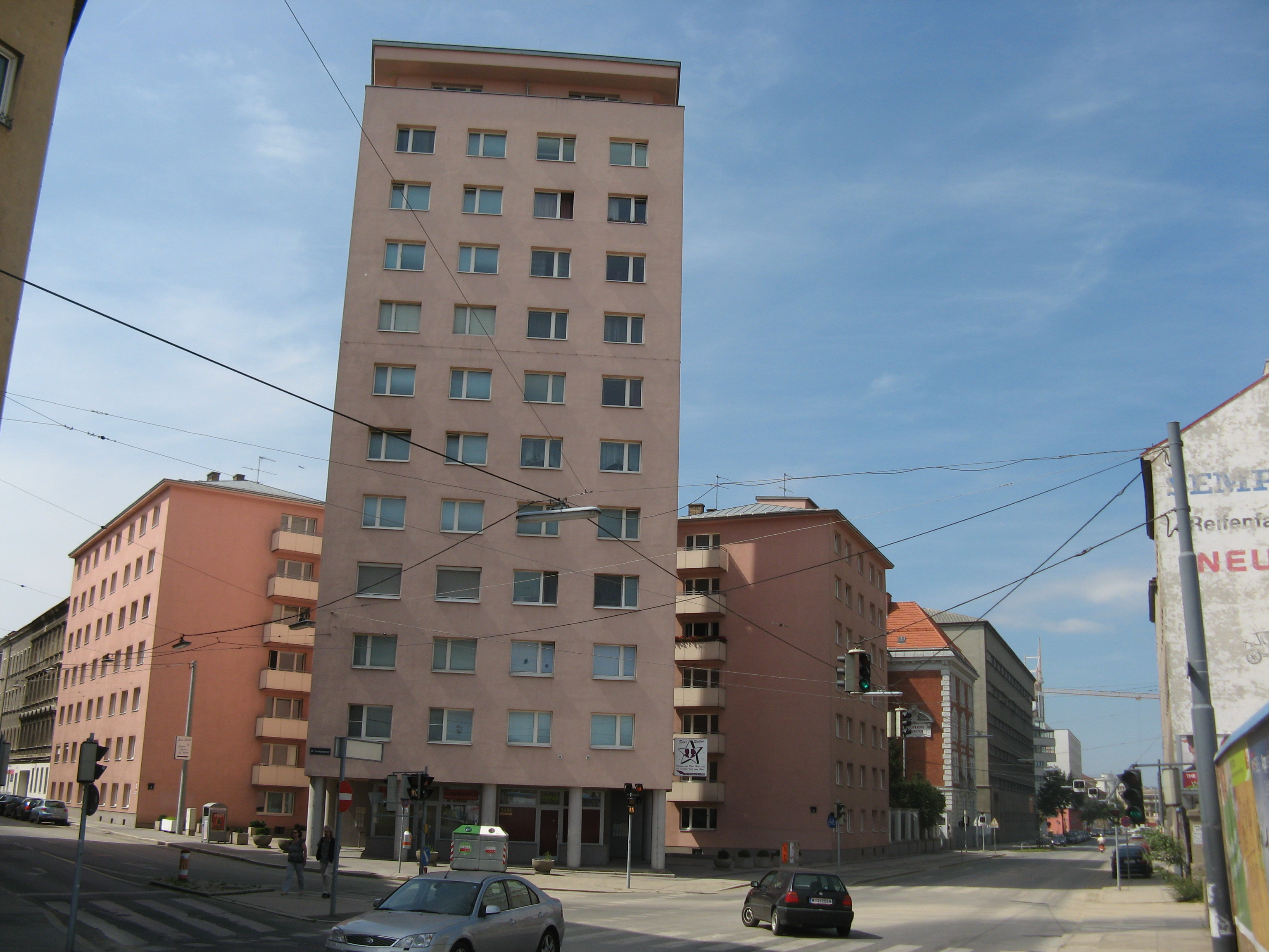 Sonnwendgasse Ecke Landgutgasse, Wien-Favoriten